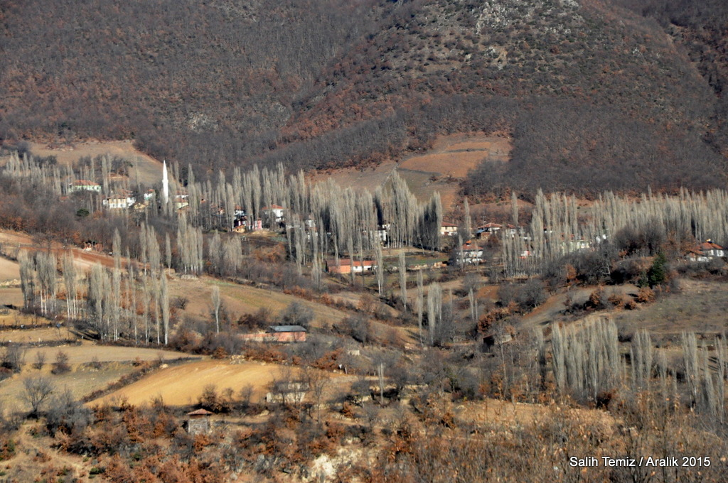 Gümüşalan'da Aralık 2015